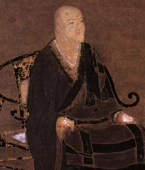 Dogen